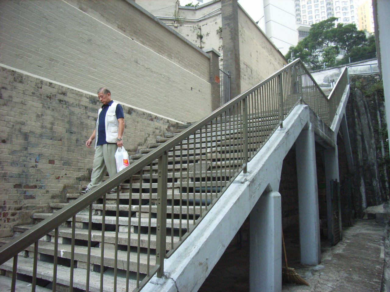 Pound Lane, Sheung Wan, Hong Kong - by Papa mimi